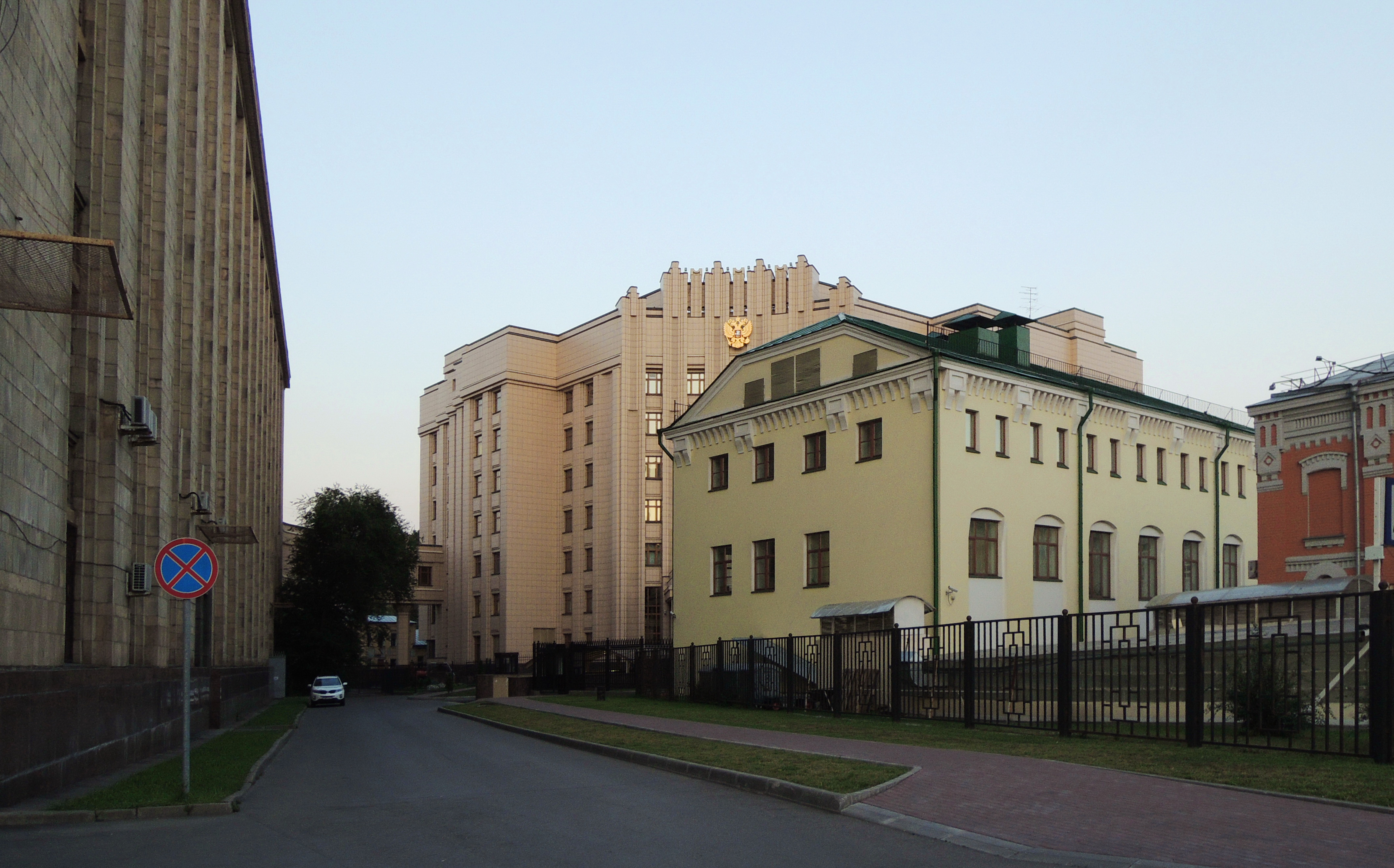 Смоленская-Сенная пл., 30 строение 6. Дом А. И. Несвицкой (левая часть, вид сбоку) Смоленский бул., 30 строение 2. Новое здание МИДа